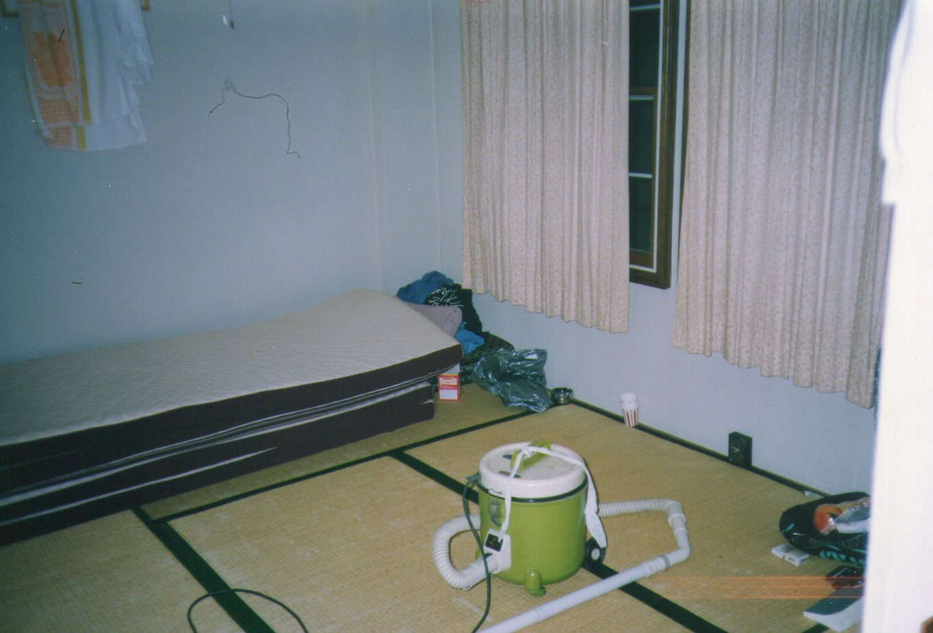 上越国際バイト寮